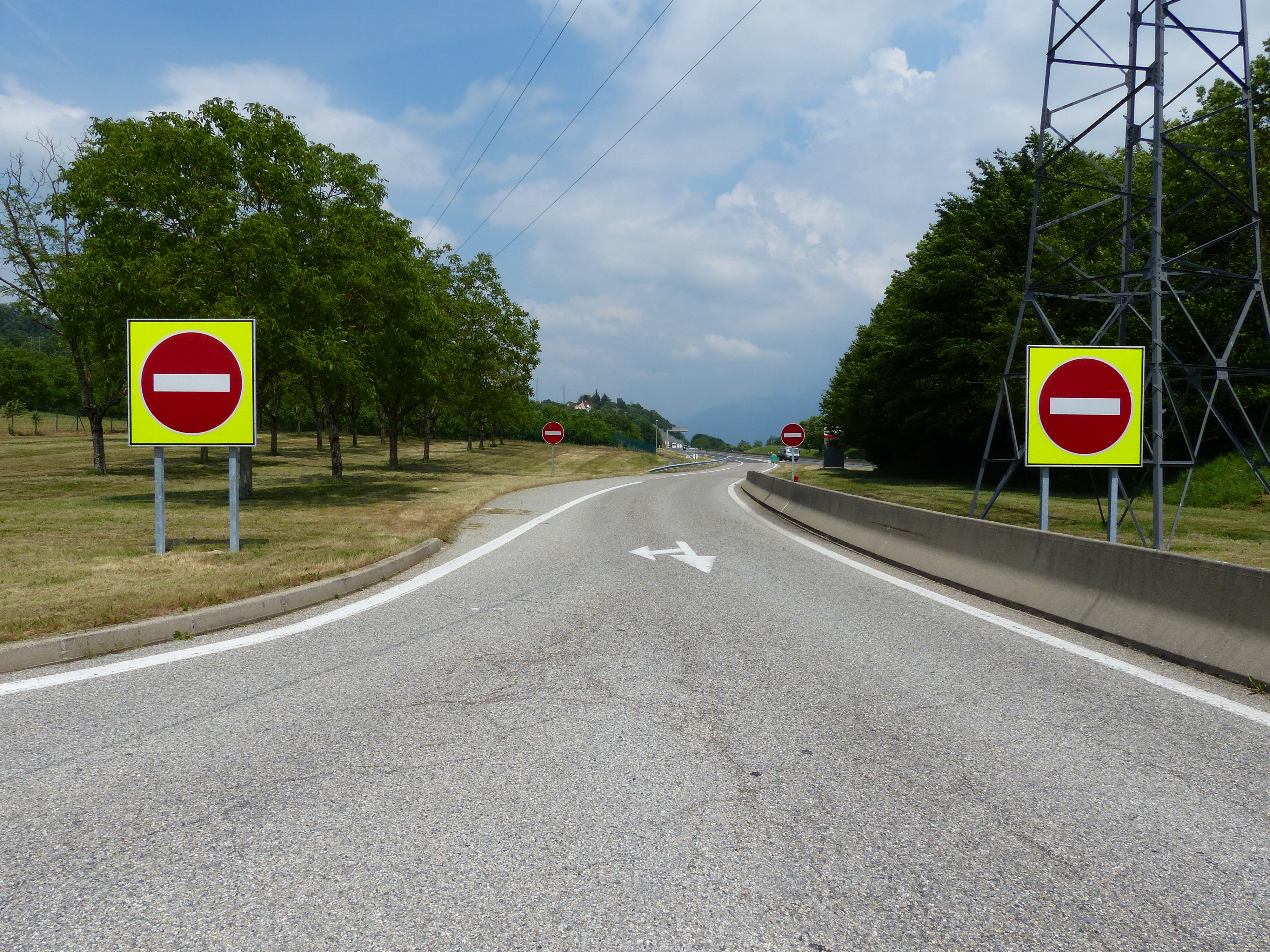 Panneaux B1j au bord de la bretelle d'entrée de l'aire de St-Sauveur, A49, Saint-Sauveur, Isère, France.